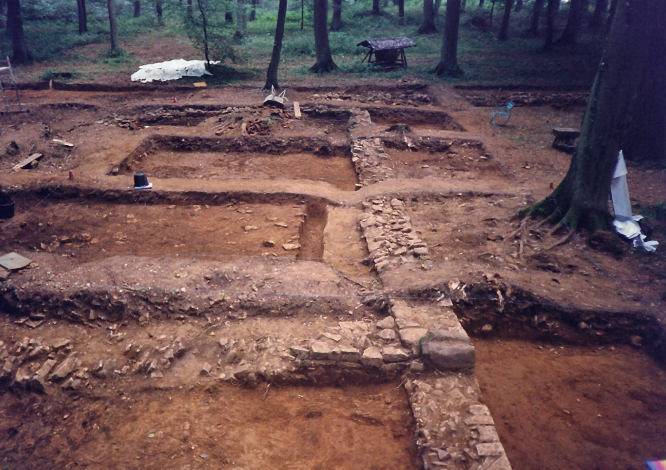 Excavations at a Gallo-Roman Villa